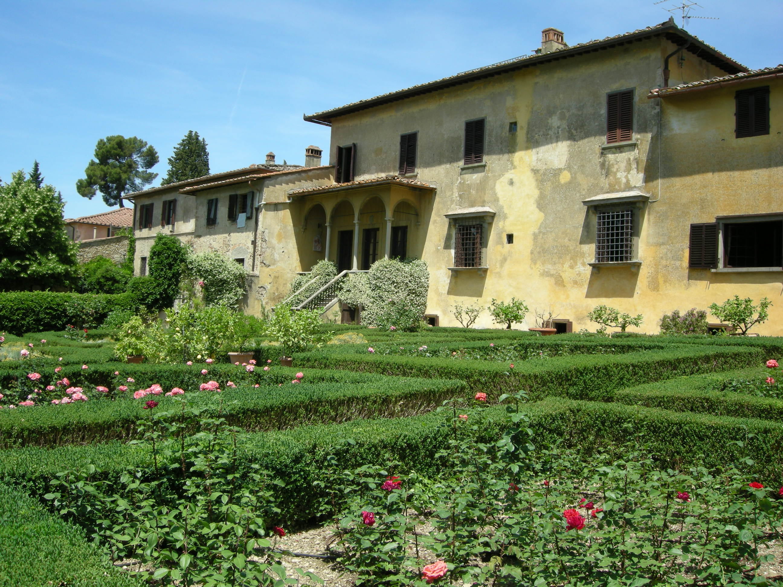 Villa badasseroni